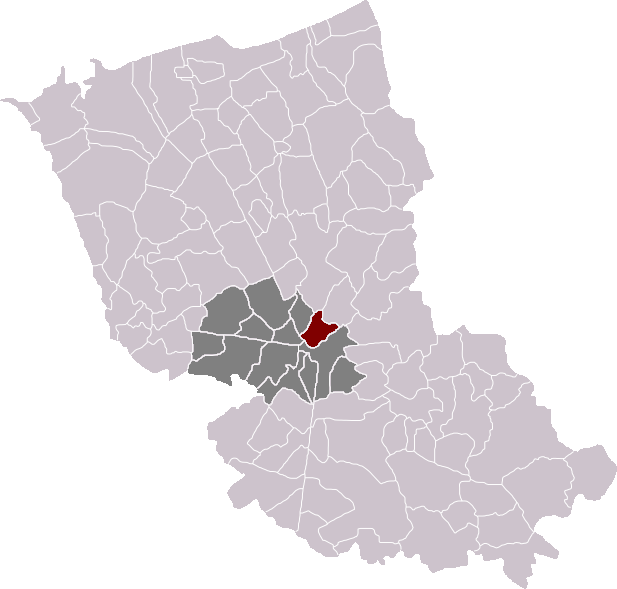 Locatie gemeente Hardefoort in arrondissement Duinkerke. Zelfgemaakt. Location of Hardifort municipality in the arrondissement of Dunkirk. Self made. Localisation de la commune d'Hardifort dans l'arrondissement de Dunkerque. Fait moi-même.